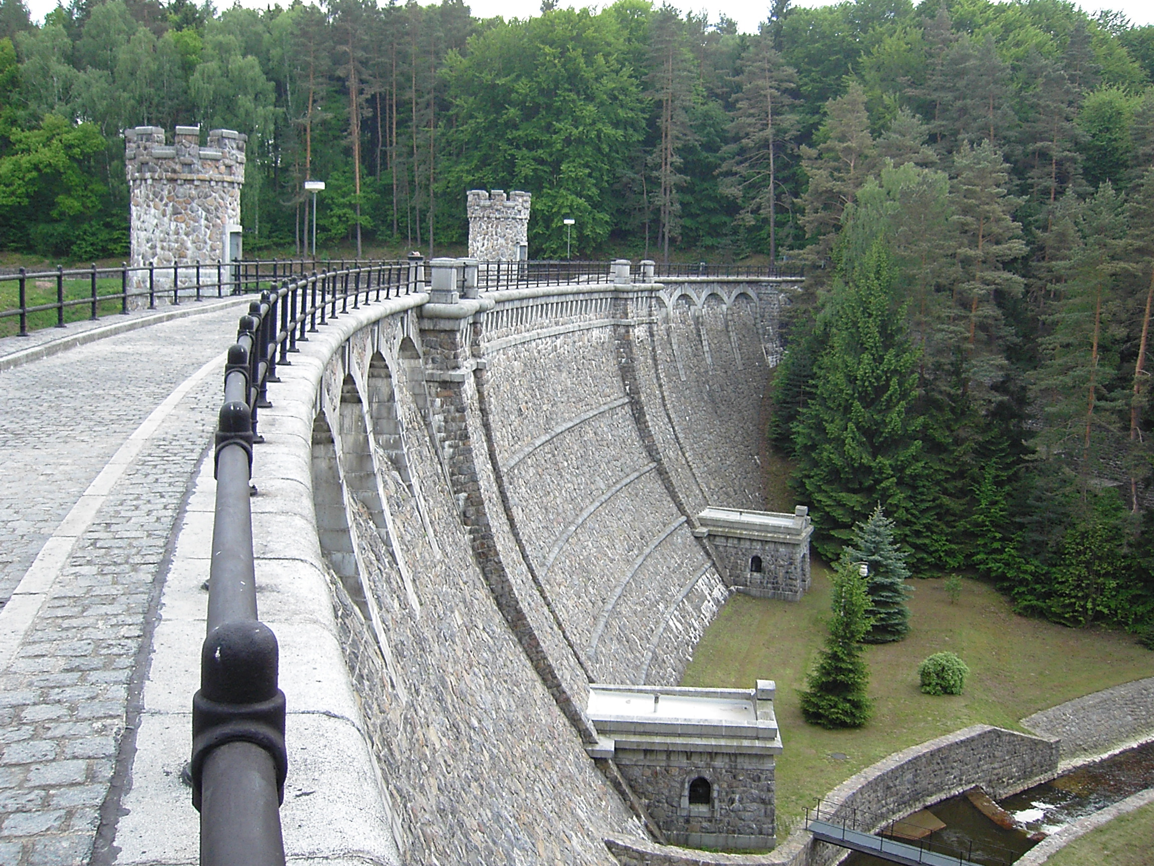 Vzdušná strana hráze nádrže Pařížov